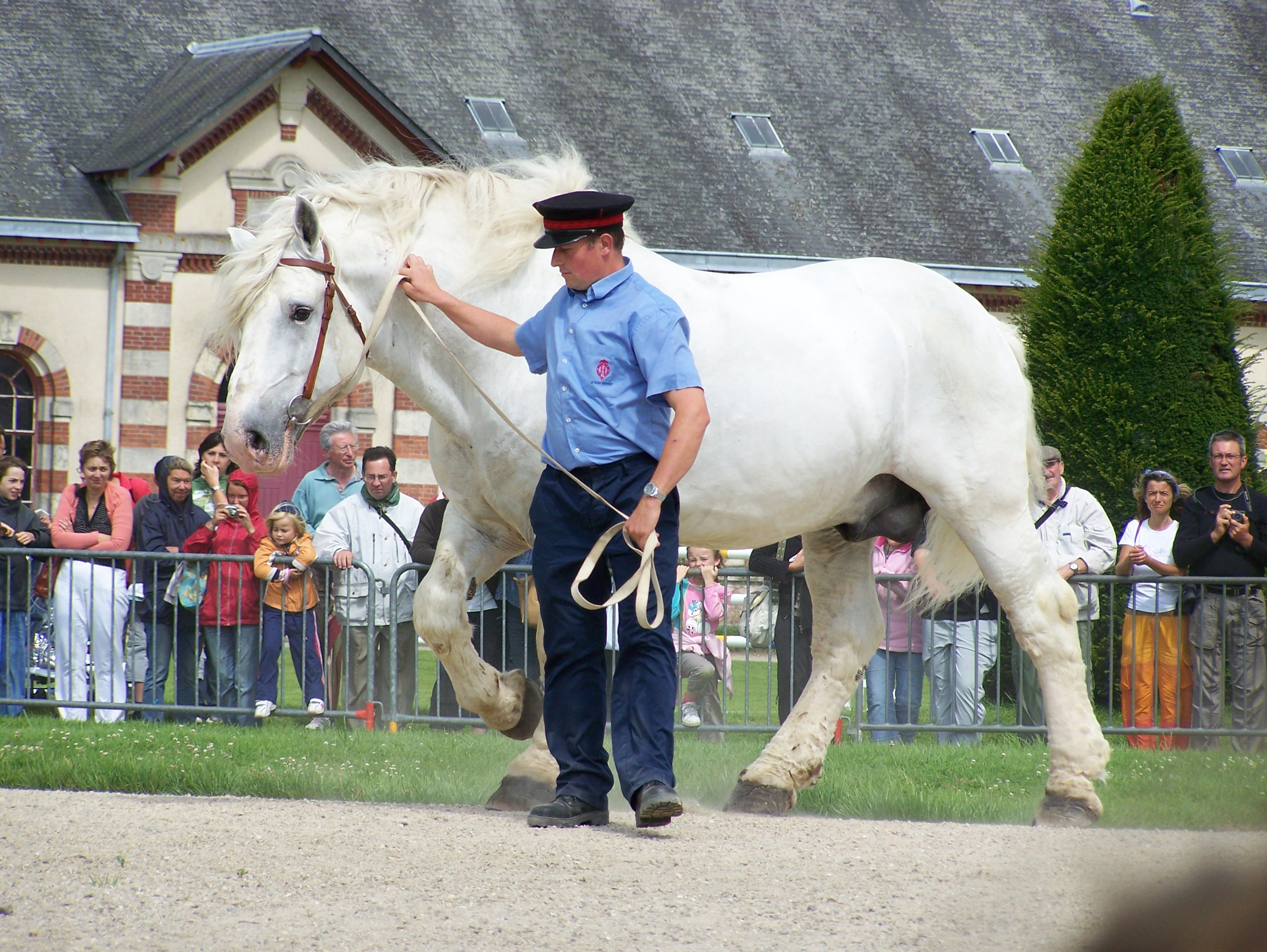 Percheron. For